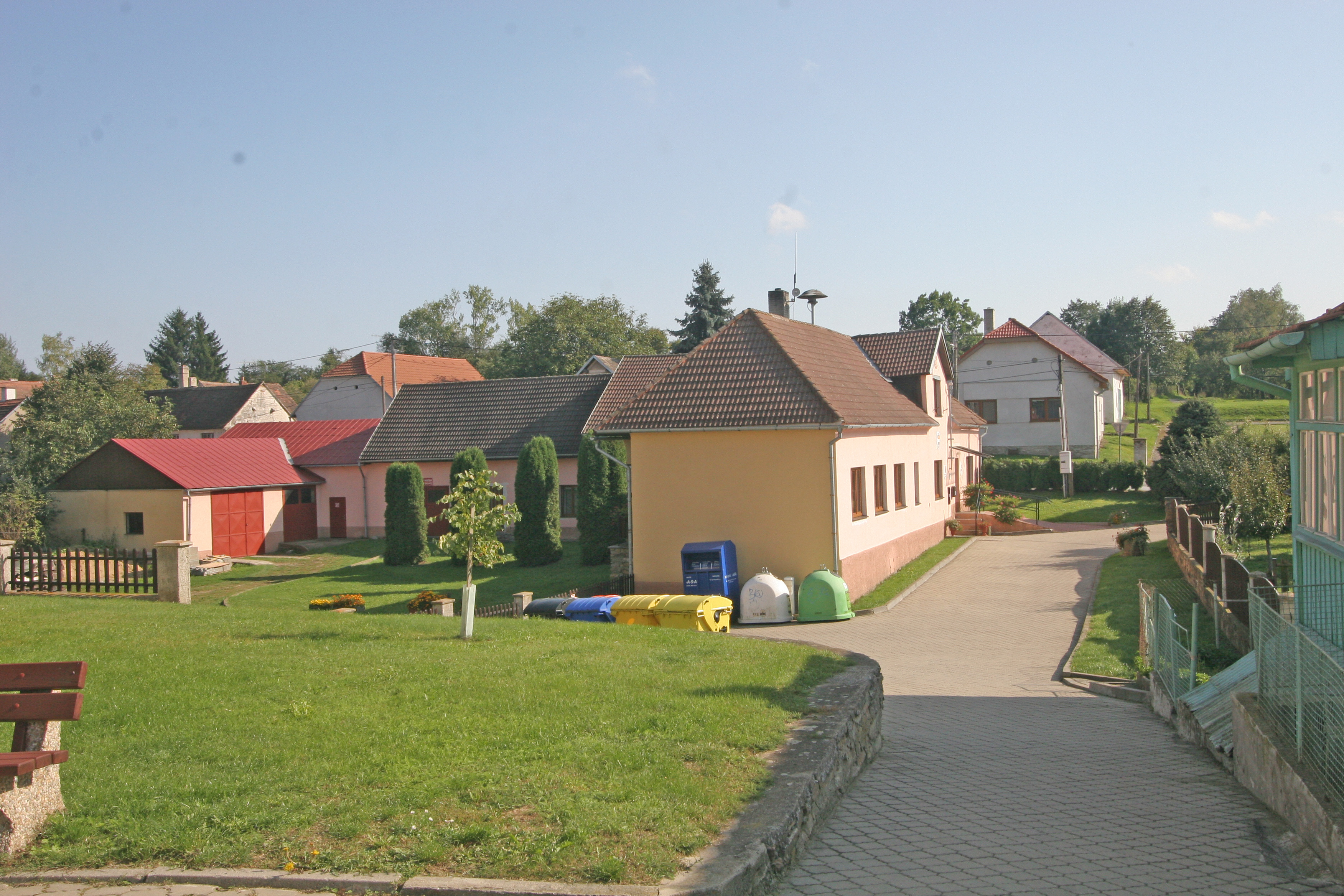 Lančov obecní úřad